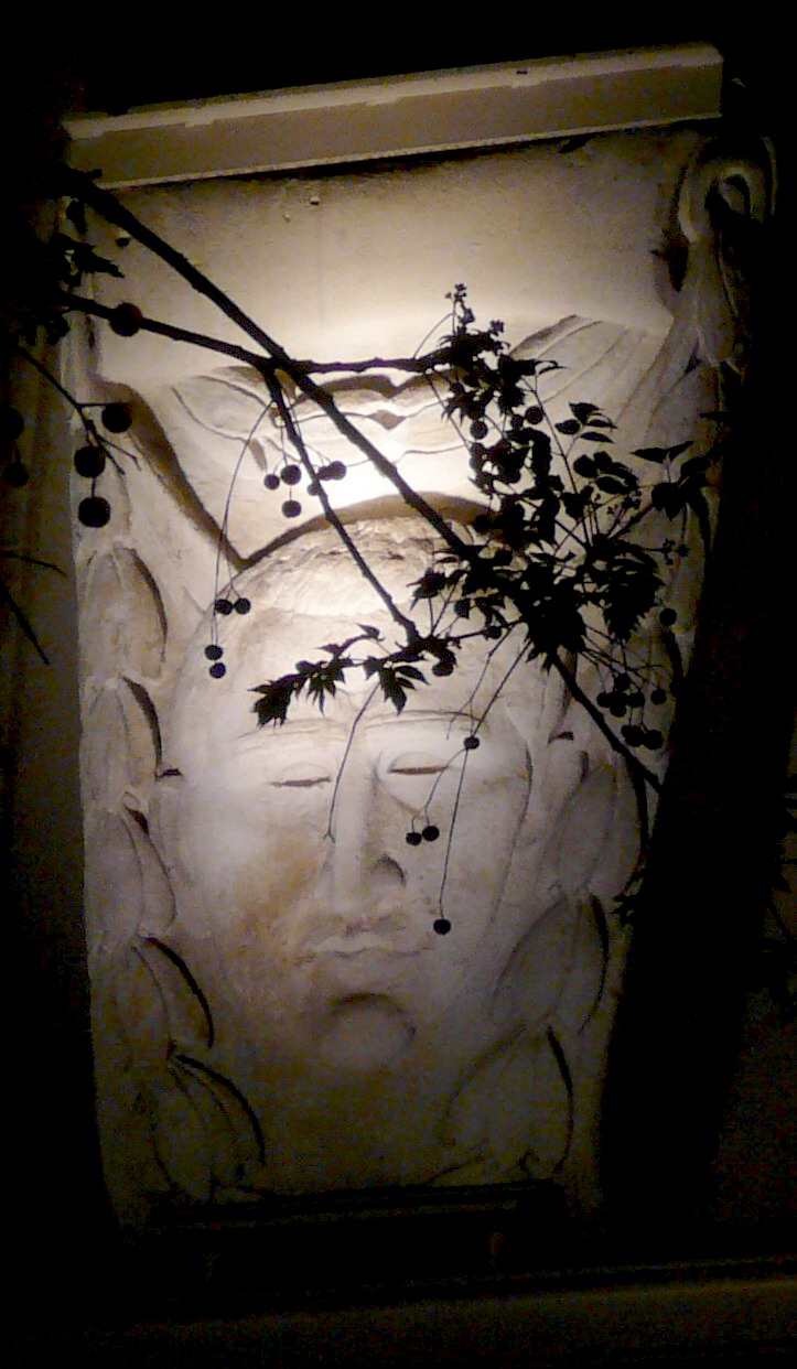 Autorretrat de Pau Gargallo